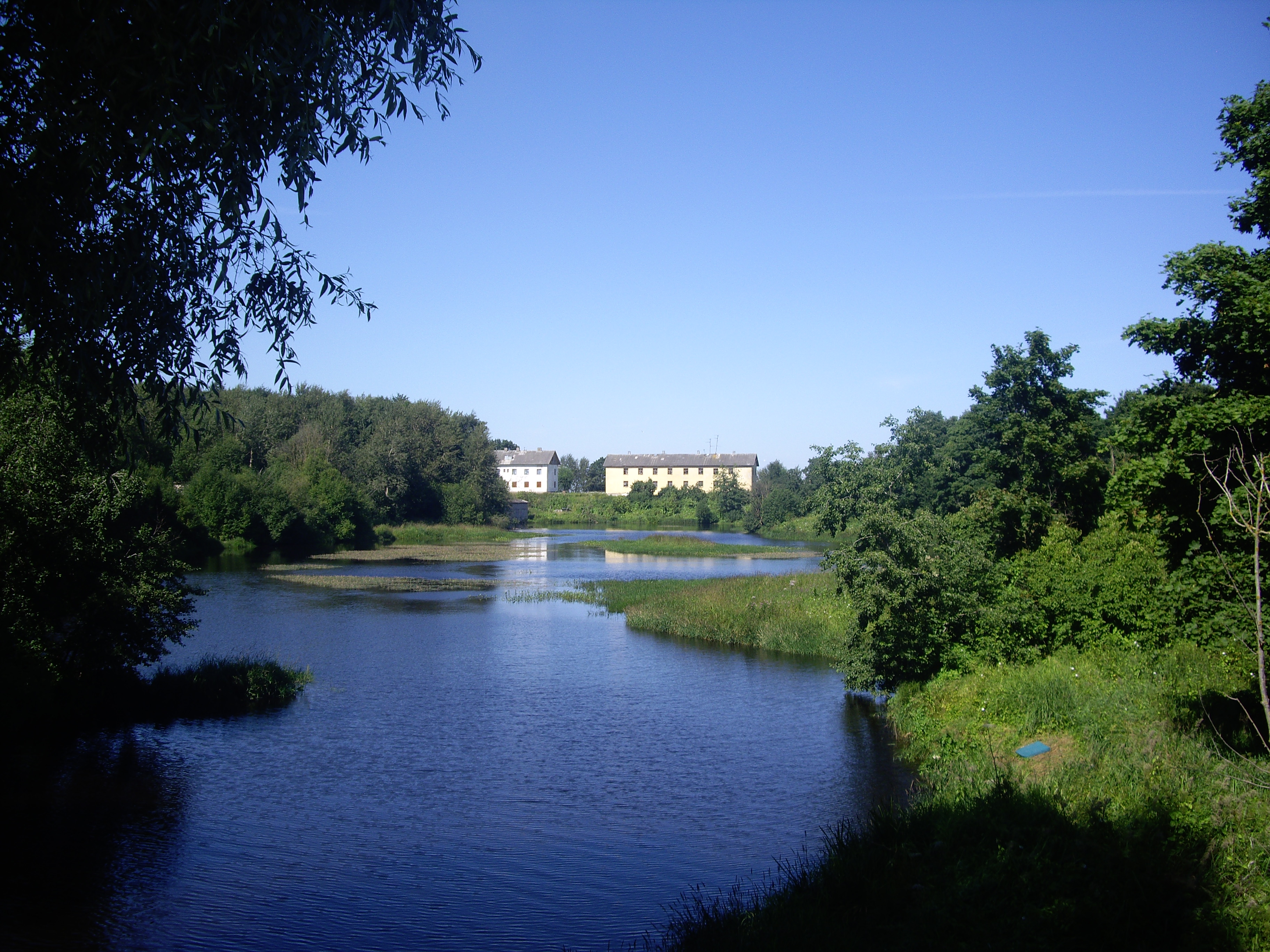 Sõtke jõgi Sillamäel